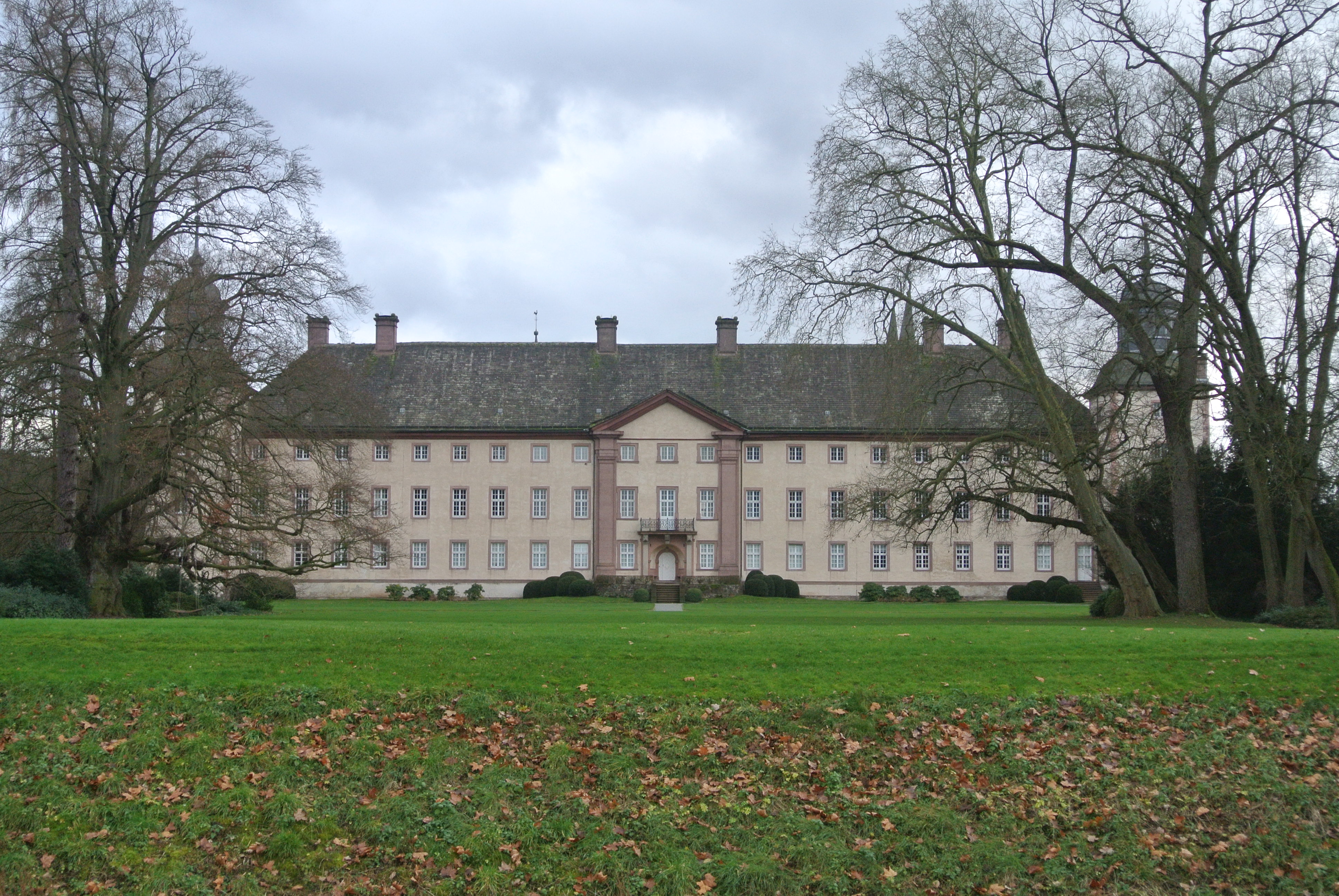 科尔维修院北面